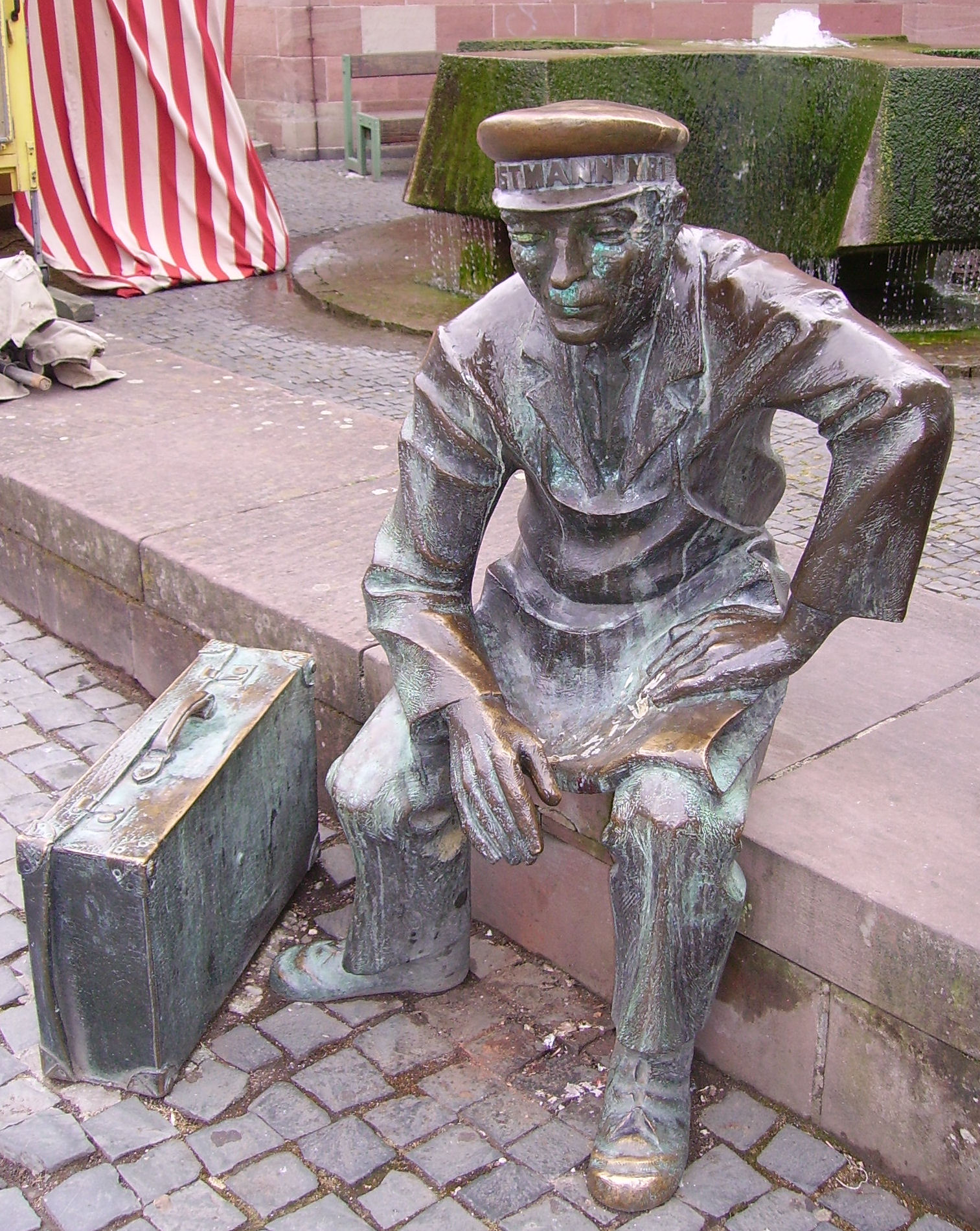 view of Zweibrücken, Germany